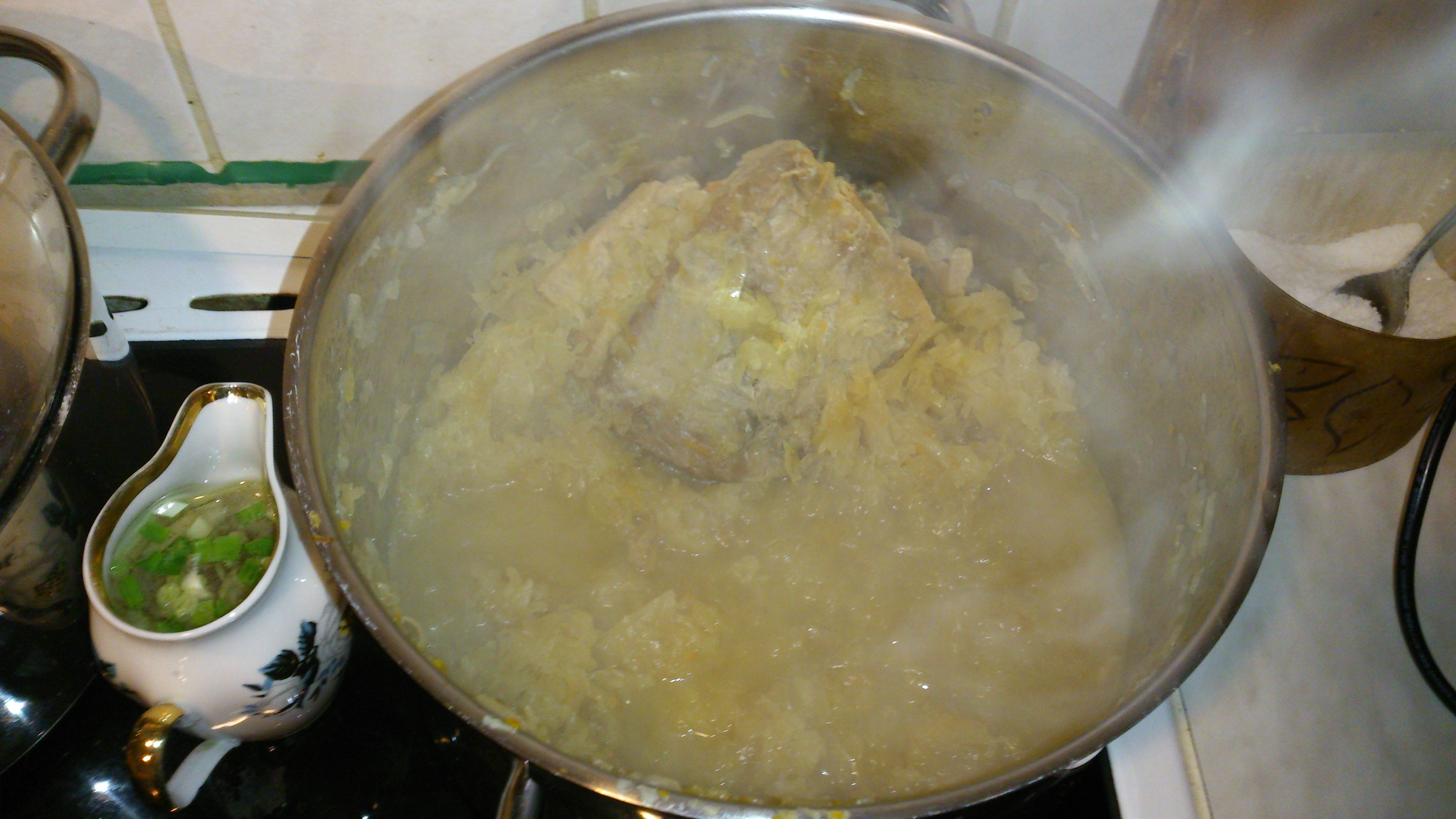 Potis keevad hapukapsad lihaga